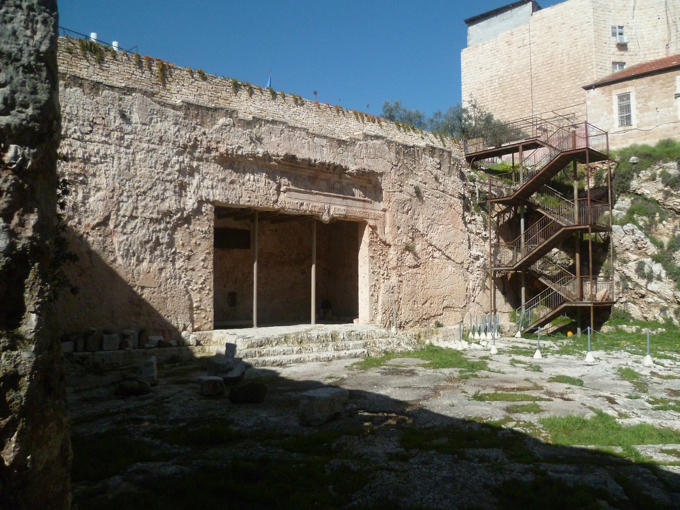 La façade principale en mars 2020, restaurée.